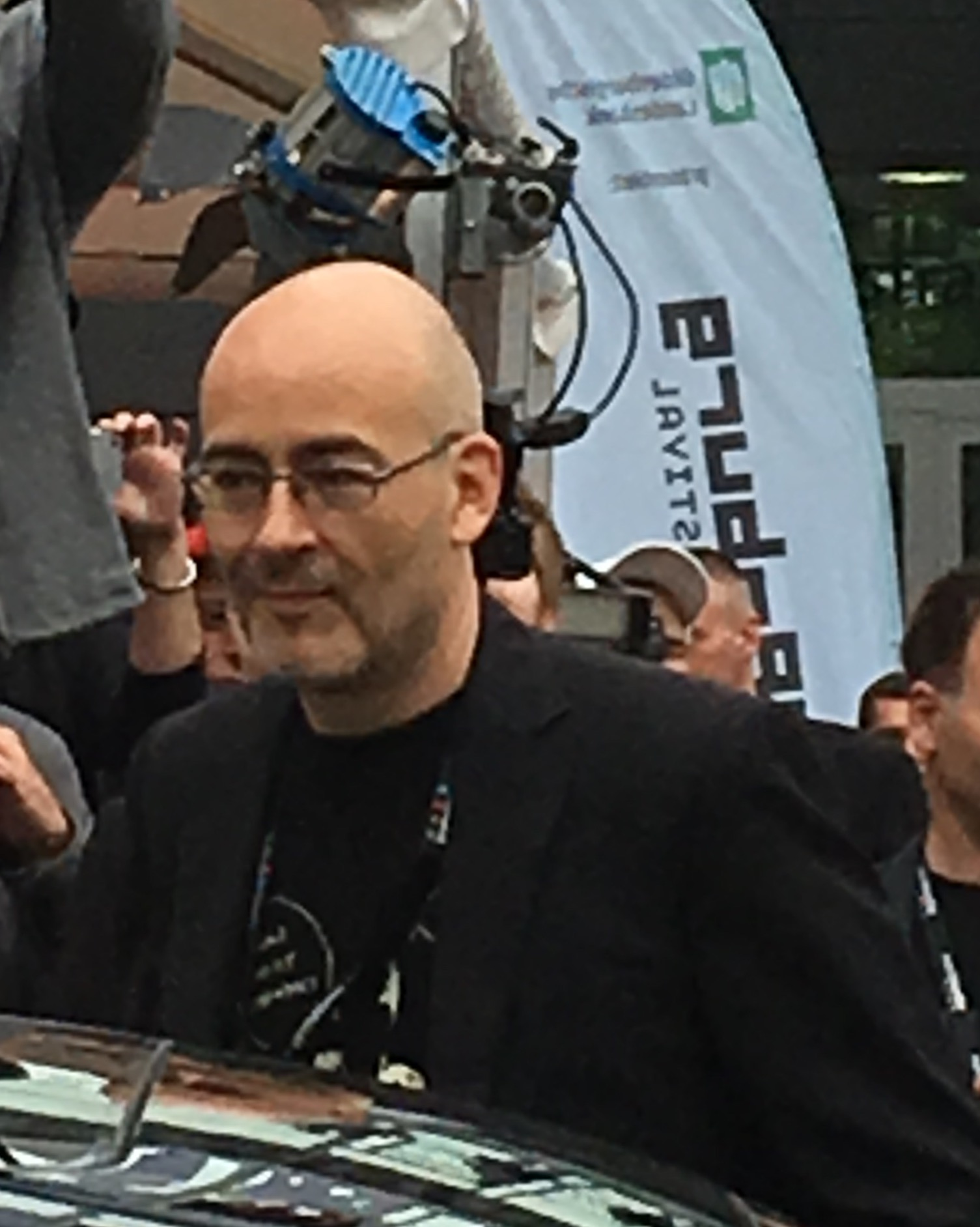 Oldenburger Filmfestorganisator Torsten Neumann